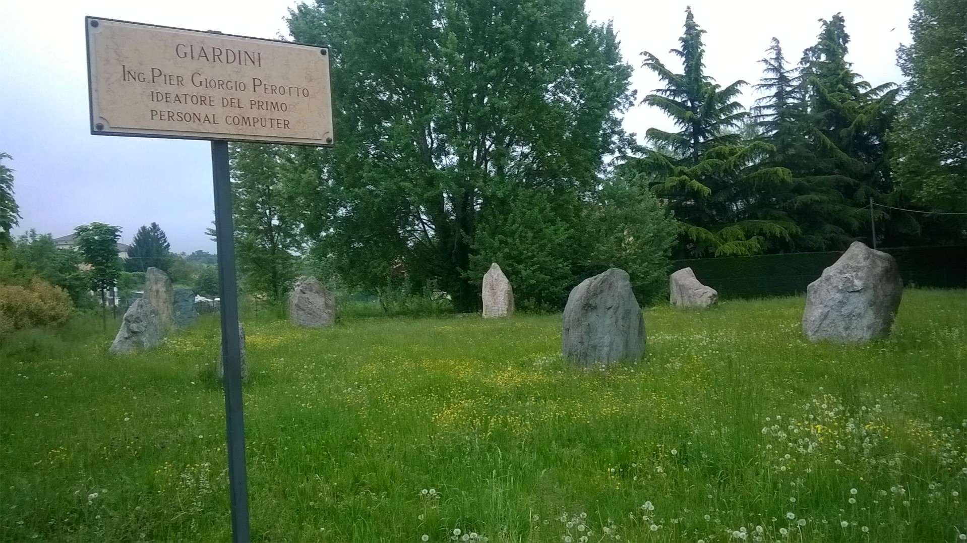 I giardini dedicati a Pier Giorgio Perotto nel comune di Cavaglià.